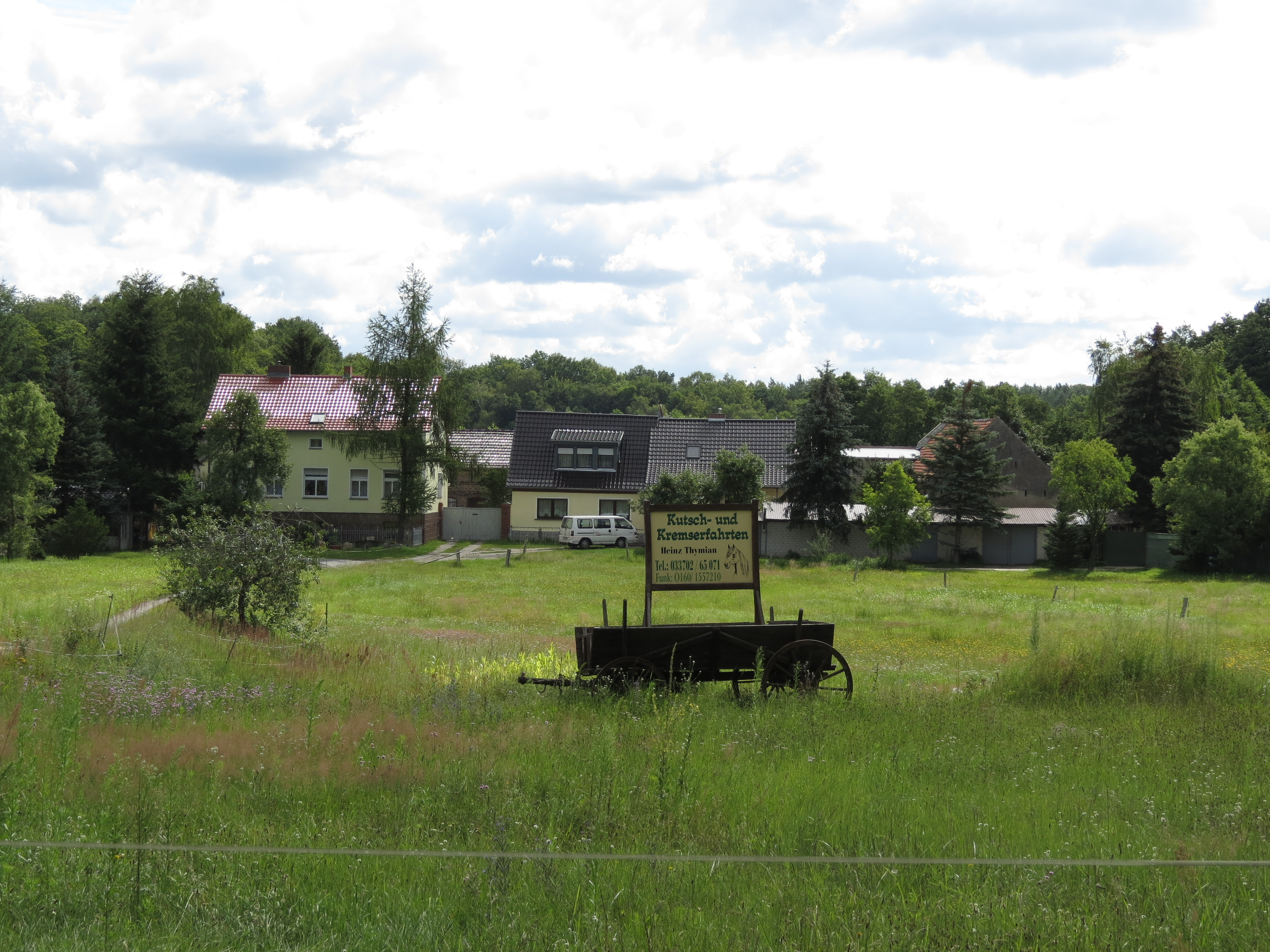 Schlotthorst, Wohnplatz der Stadt Zossen, Brandenburg, Deutschland